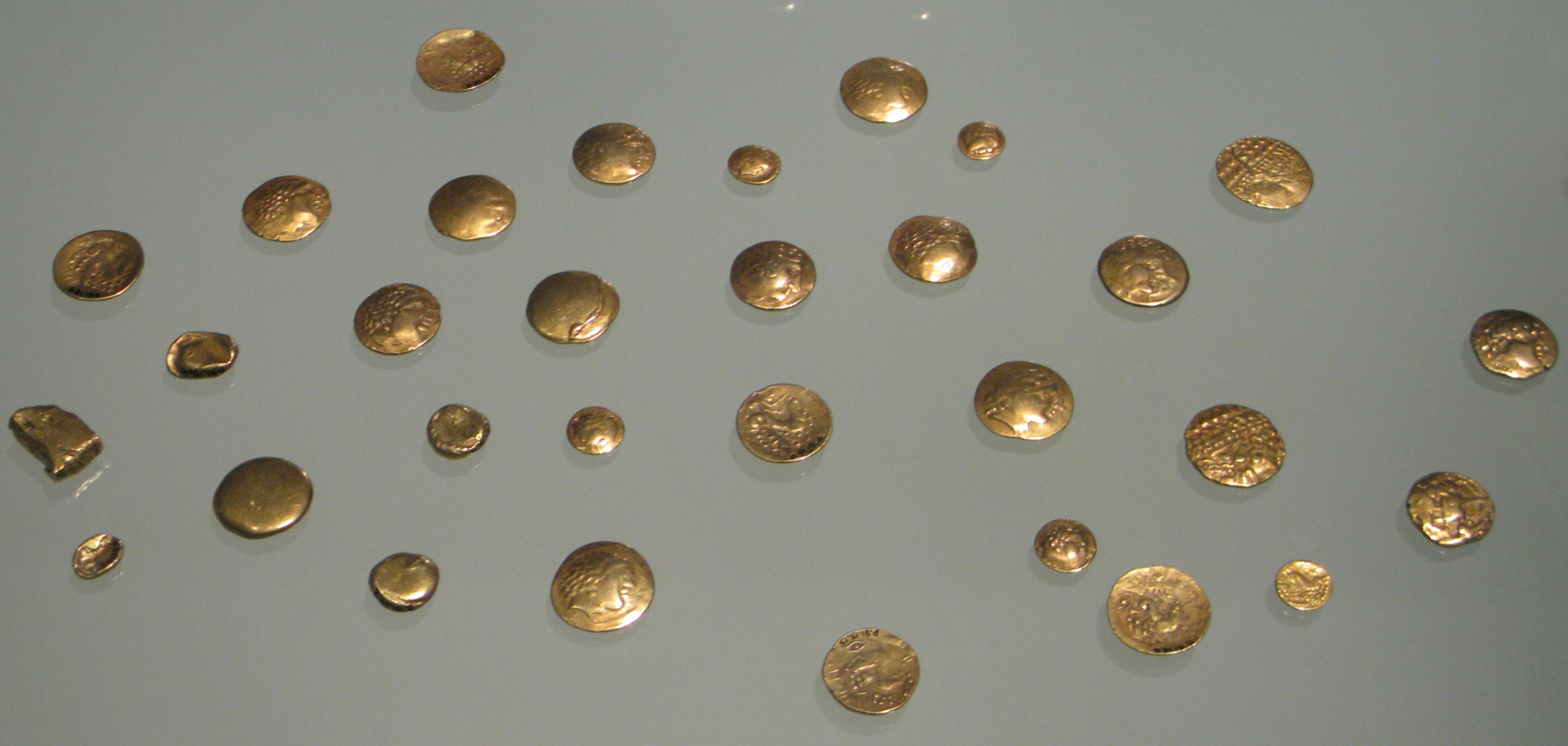 Monnaies du trésor de Trayac, exposées au musée d'Aquitaine de Bordeaux.